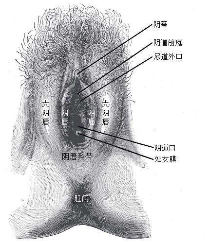 女性外生殖器官。小阴唇被拉开。